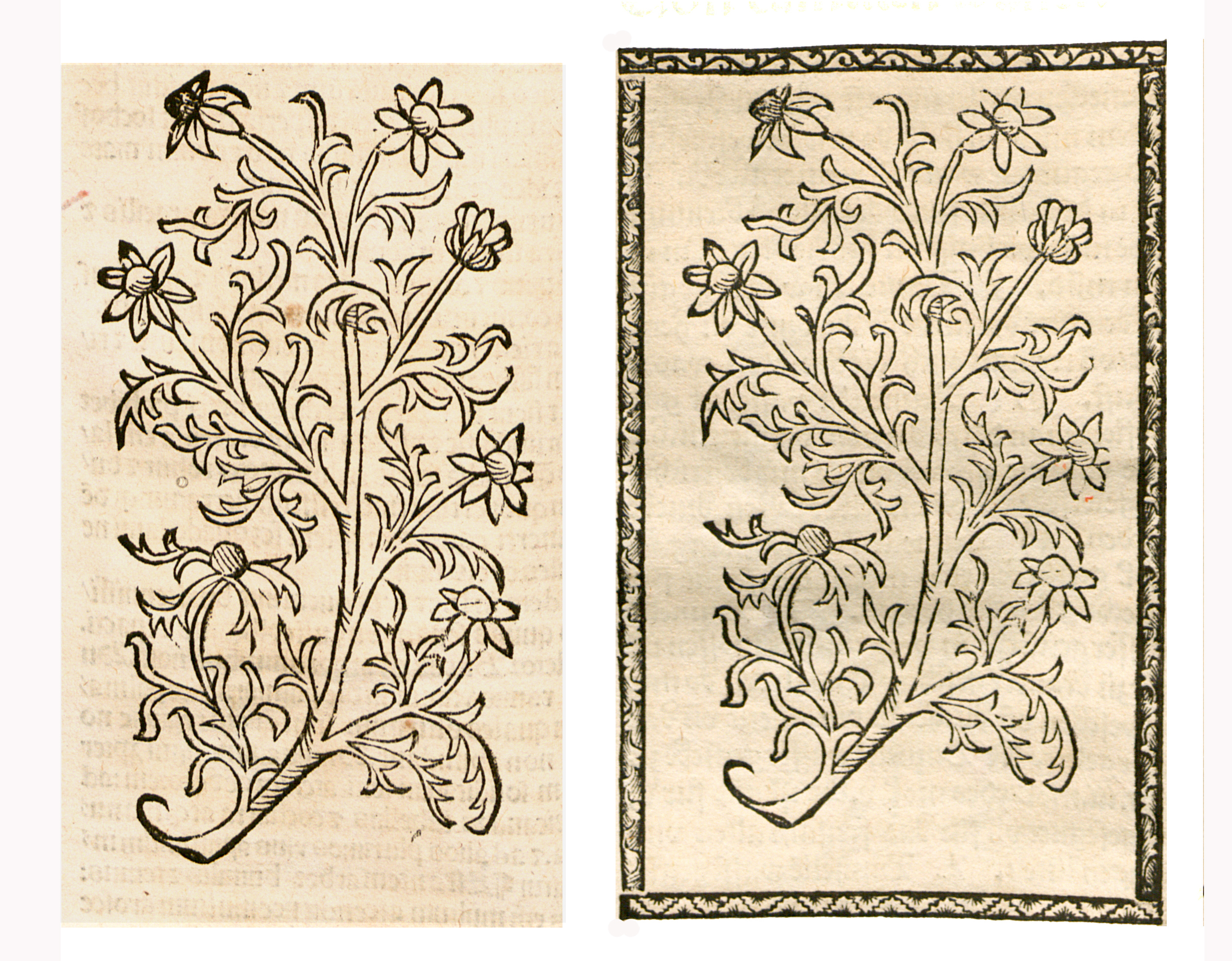 Abbildung von: Kamille